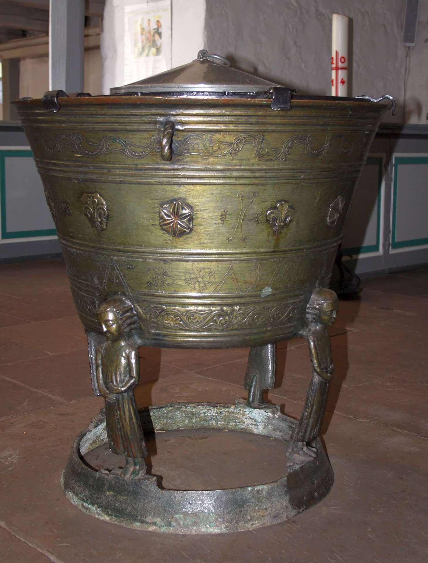 Bronzetaufbecken (14. Jh.) in St. Johannis in Salzhausen